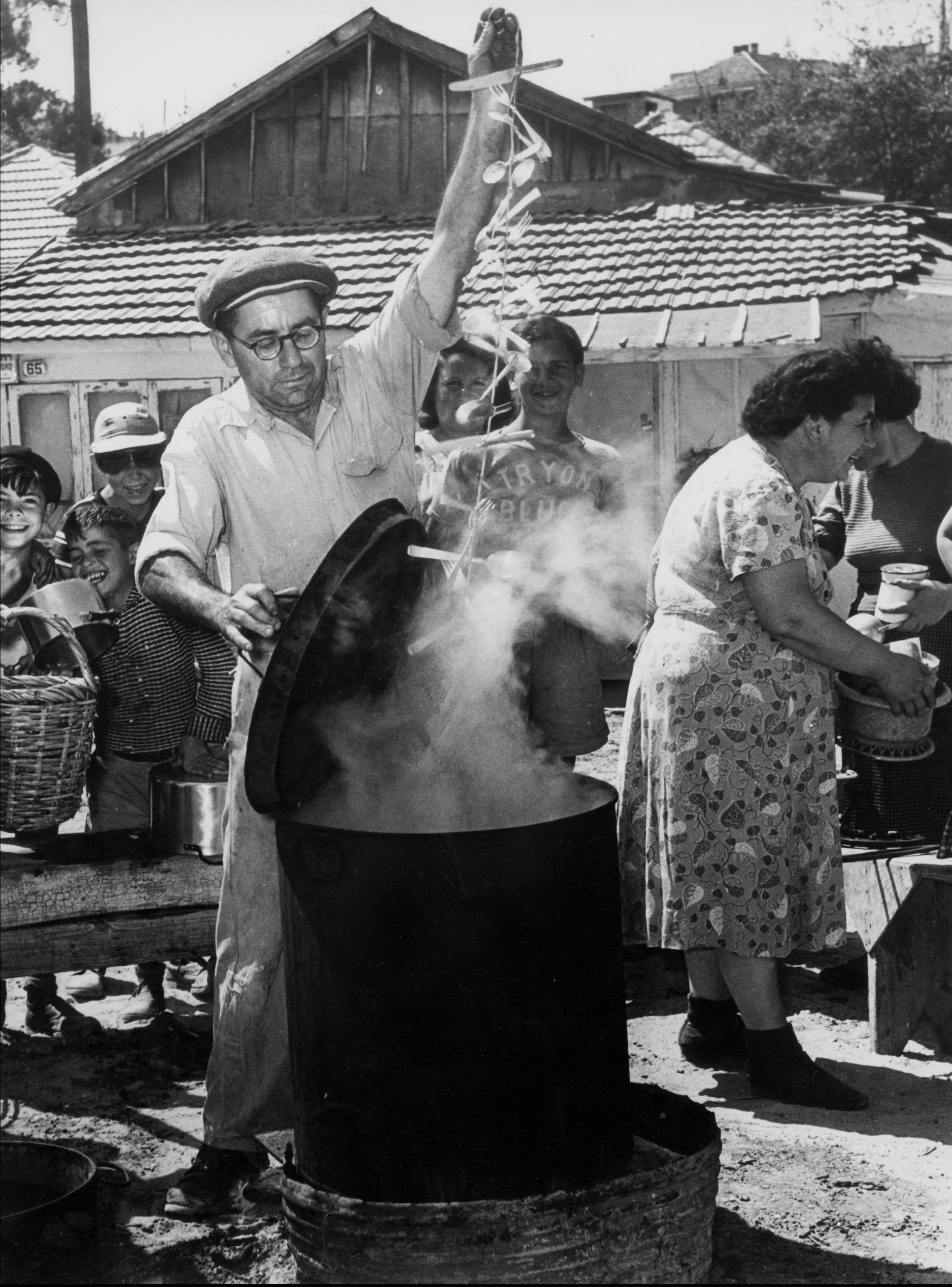 Immersion of pots in boiling water in order to make them useable on Passover in the Florentin neighborhood in Tel Aviv. הגעלת סירים במים רותחים על מנת להכשירם לפסח בשכונת פלורנטין בתל אביב